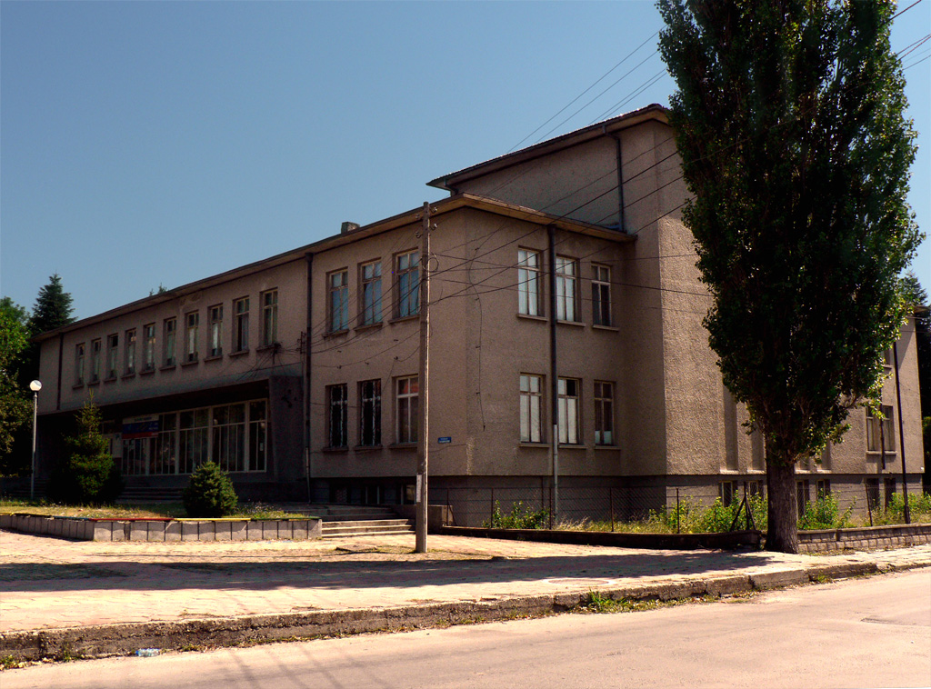 Народно читалище "Иван Вазов" с. Първомайци